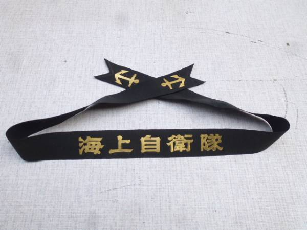 ペンネント海上自衛隊